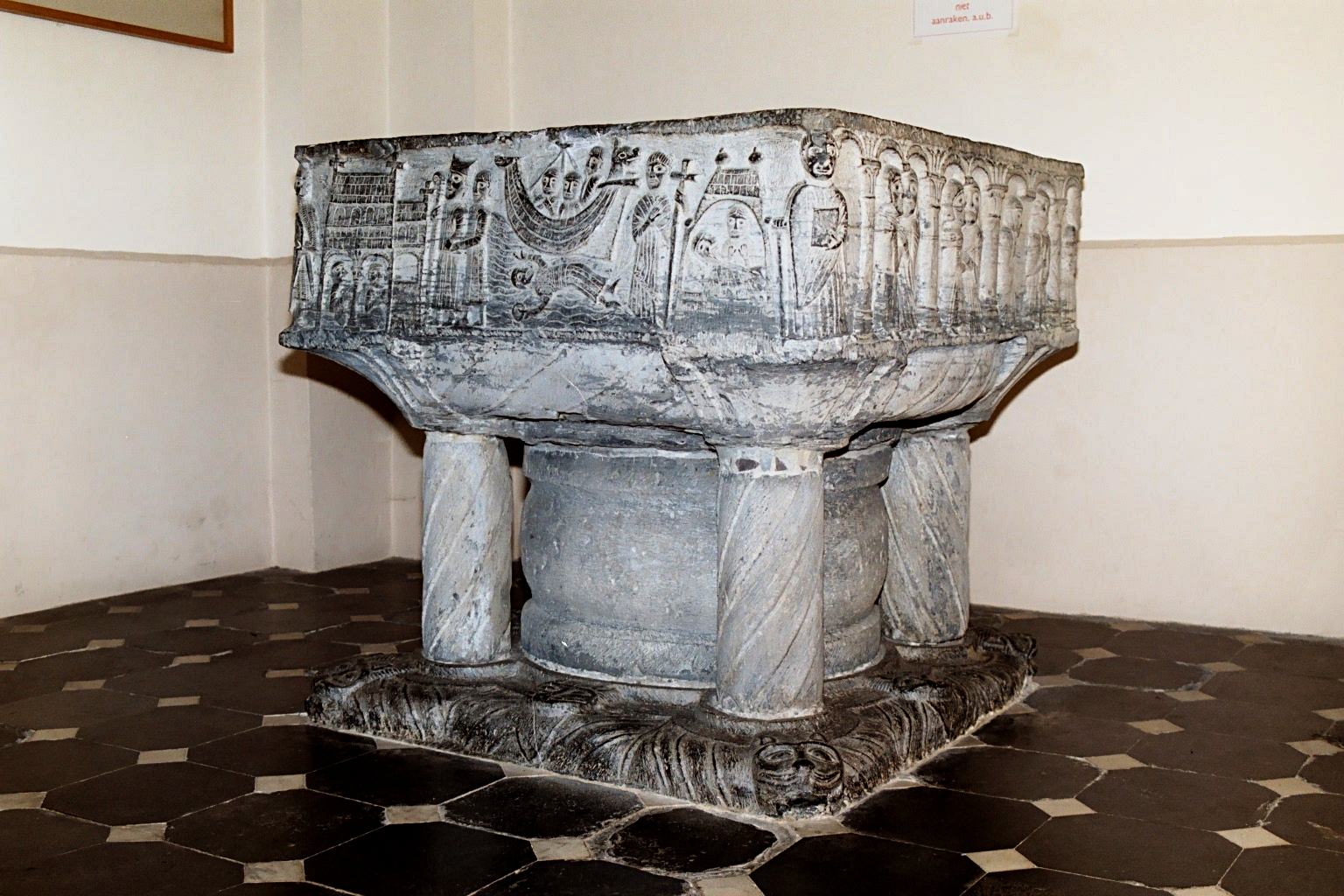 Belgique - Flandre - Fonts baptismaux romans de Zedelgem